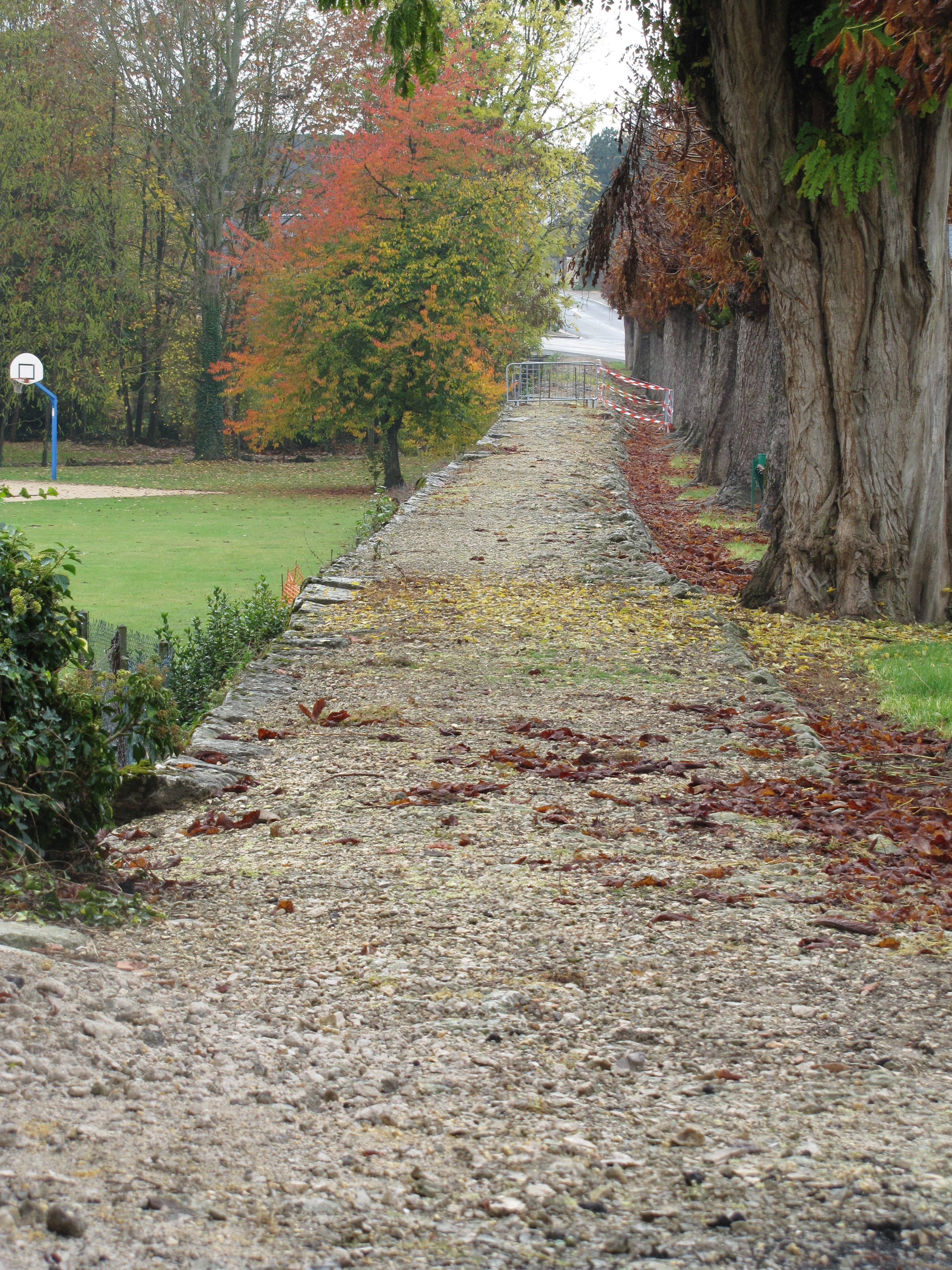 Partie de la voie romaine qui passe à Verdes (Loir-et-Cher, France) .